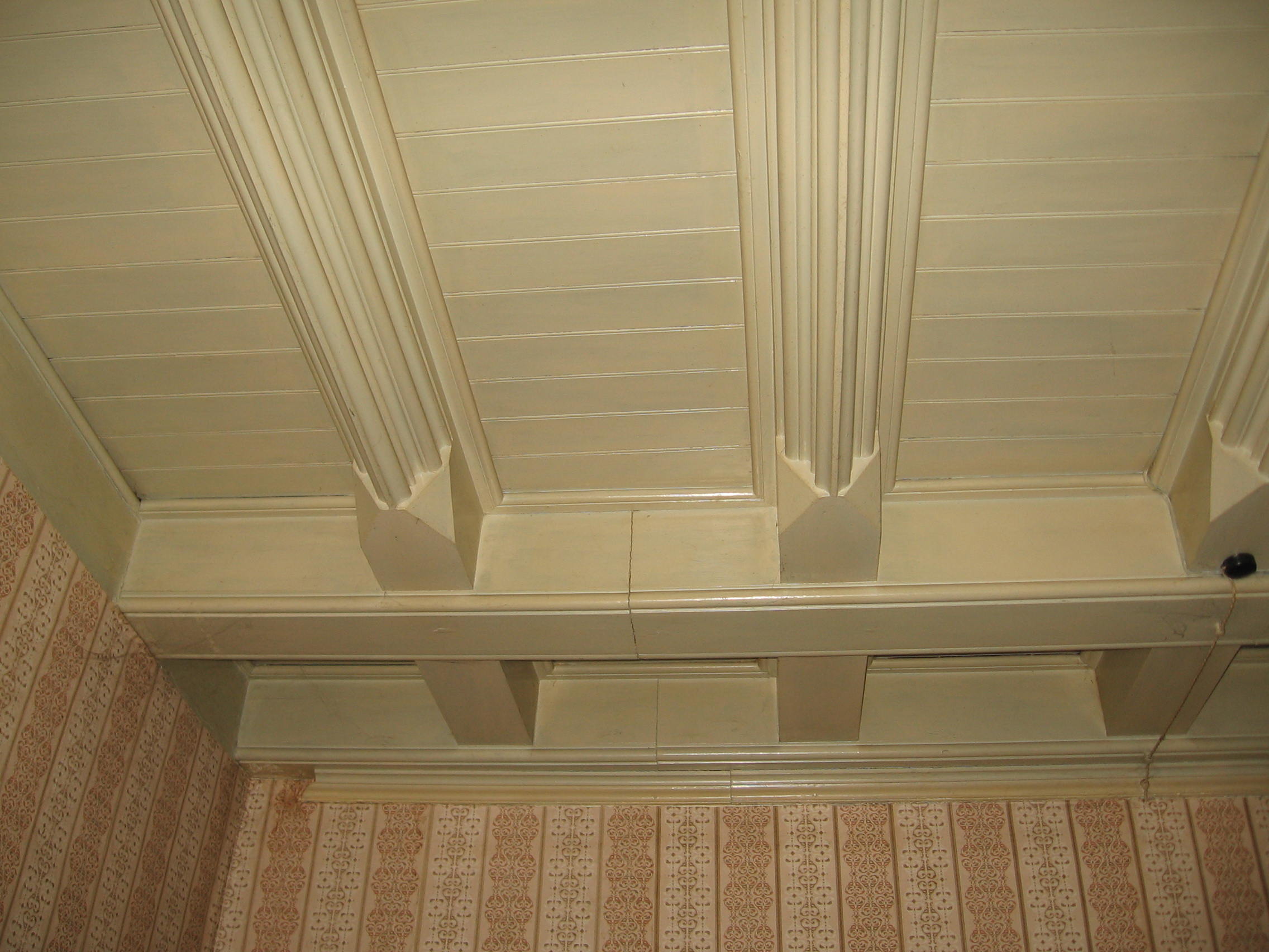 Беларуская (тарашкевіца): Былая сядзіба Трамбіцкіх (Інтэрнацыянальны). Аздабленне столі. This is a photo of Belarusian heritage monument. Reference number: 113Г000610 ( WLM)